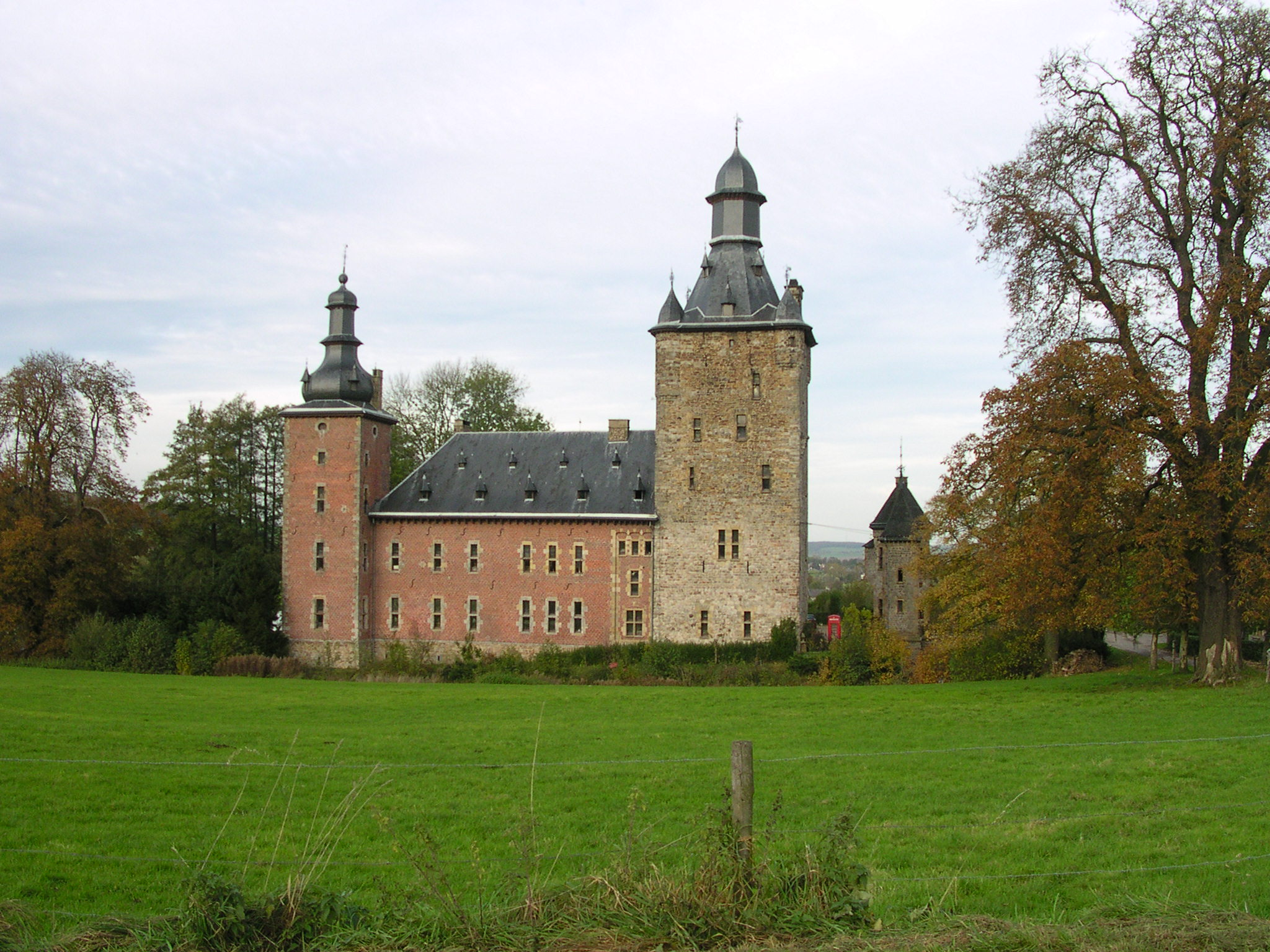 Sippenaeken Burg Beusdael